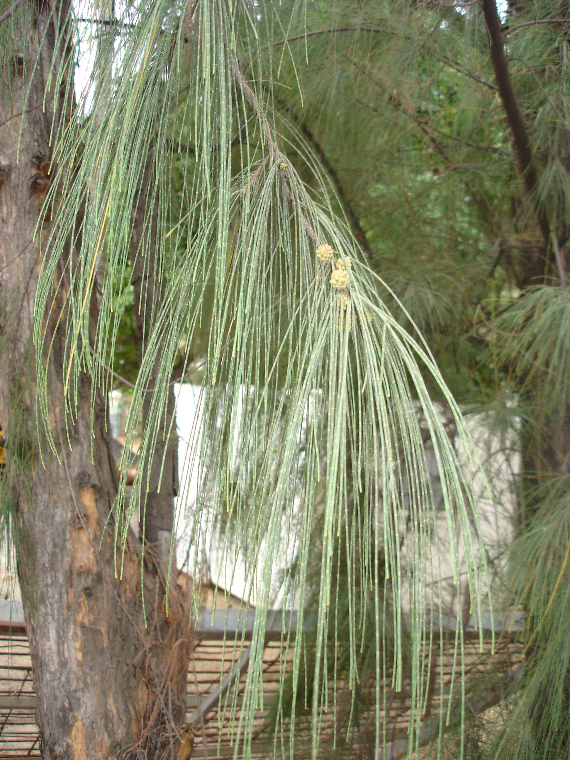 Description: Casuarina equisetifolia, "Filao", novembre 2004, La Réunion. Source: Bouba